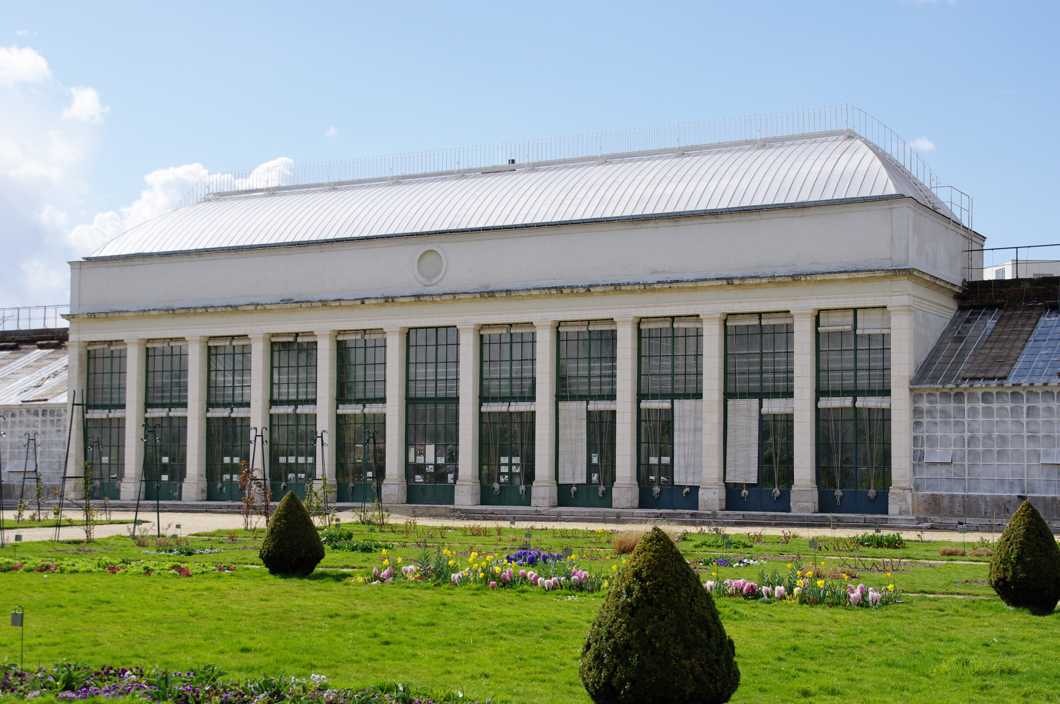 Orangerie du jardin des plantes, Orléans, Loiret, France